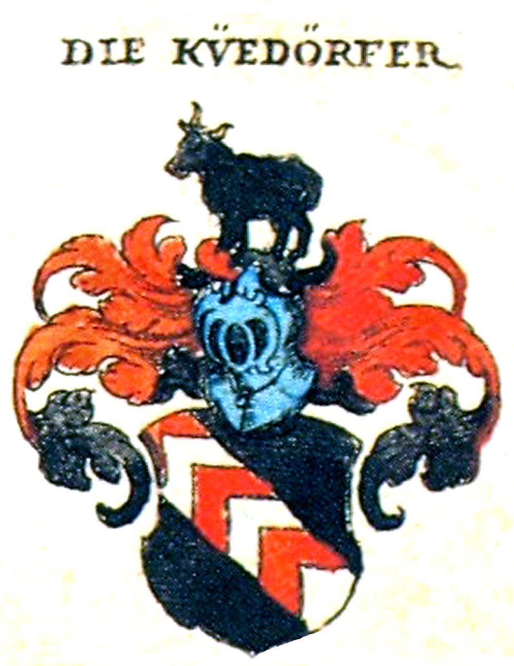 Wappen der Nürnberger Patrizierfamilie Küdorfer. Die Küdorfer waren auch als Ritter im fränkischen Adel immatrikuliert.